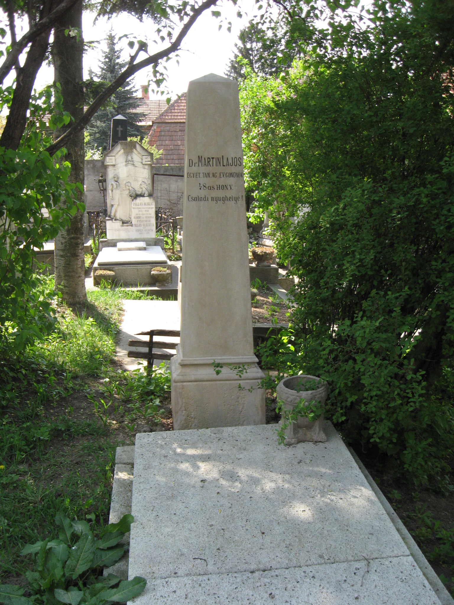 Házsongárdi temető: Martin Lajos sírja